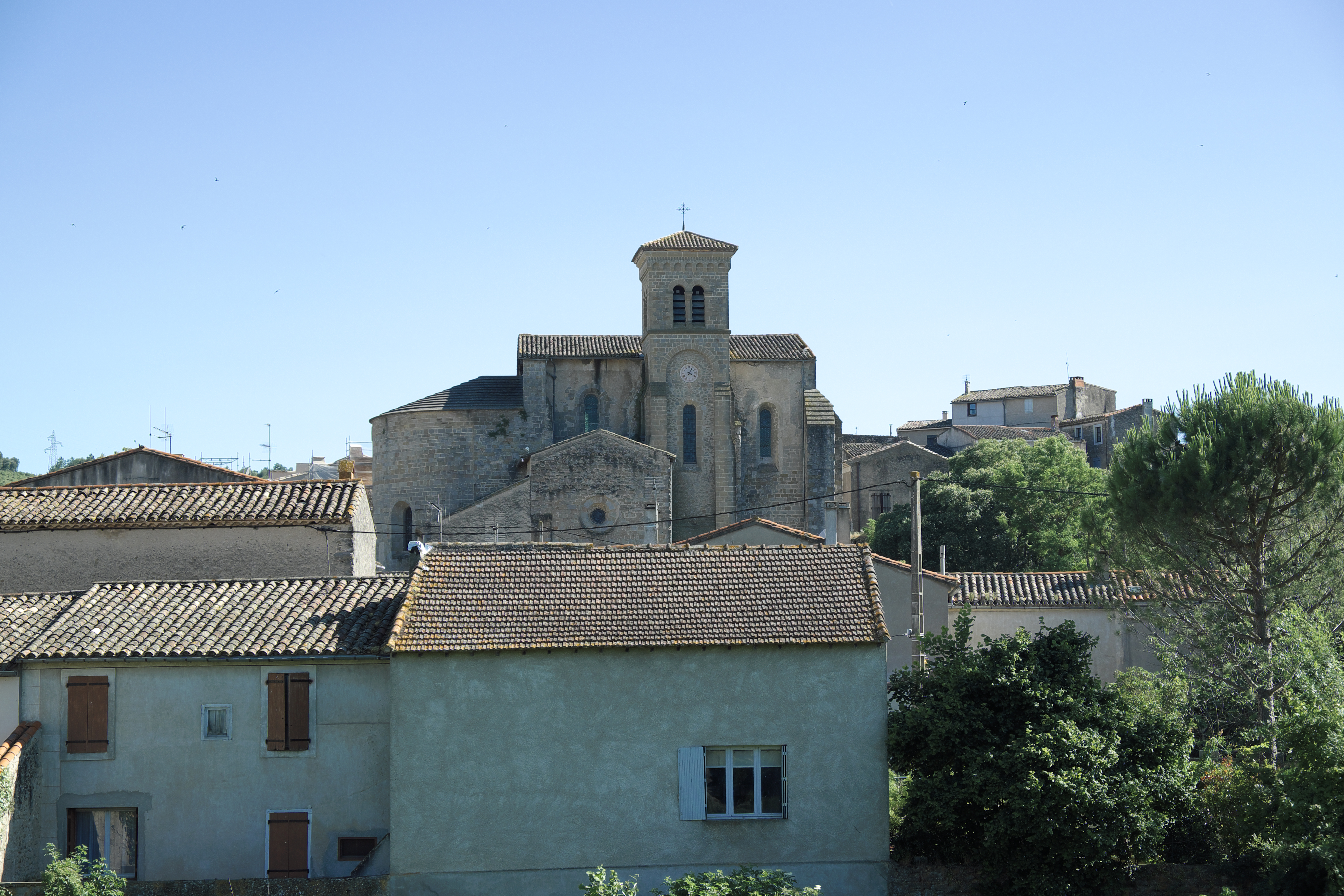 Katholische Pfarrkirche, ehemalige Abteikirche der Abtei Saint-Hilaire in Saint-Hilaire im Département Aude (Region Languedoc-Roussillon/Frankreich)